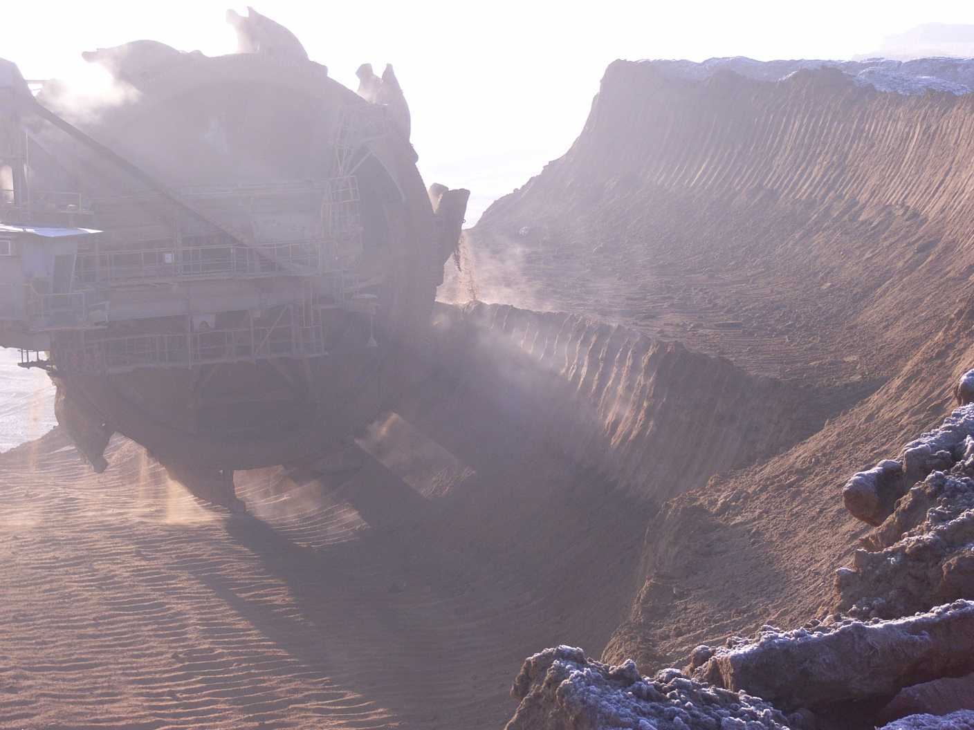 Schaufelradbagger 258 im Tagebau Garzweiler, NRW